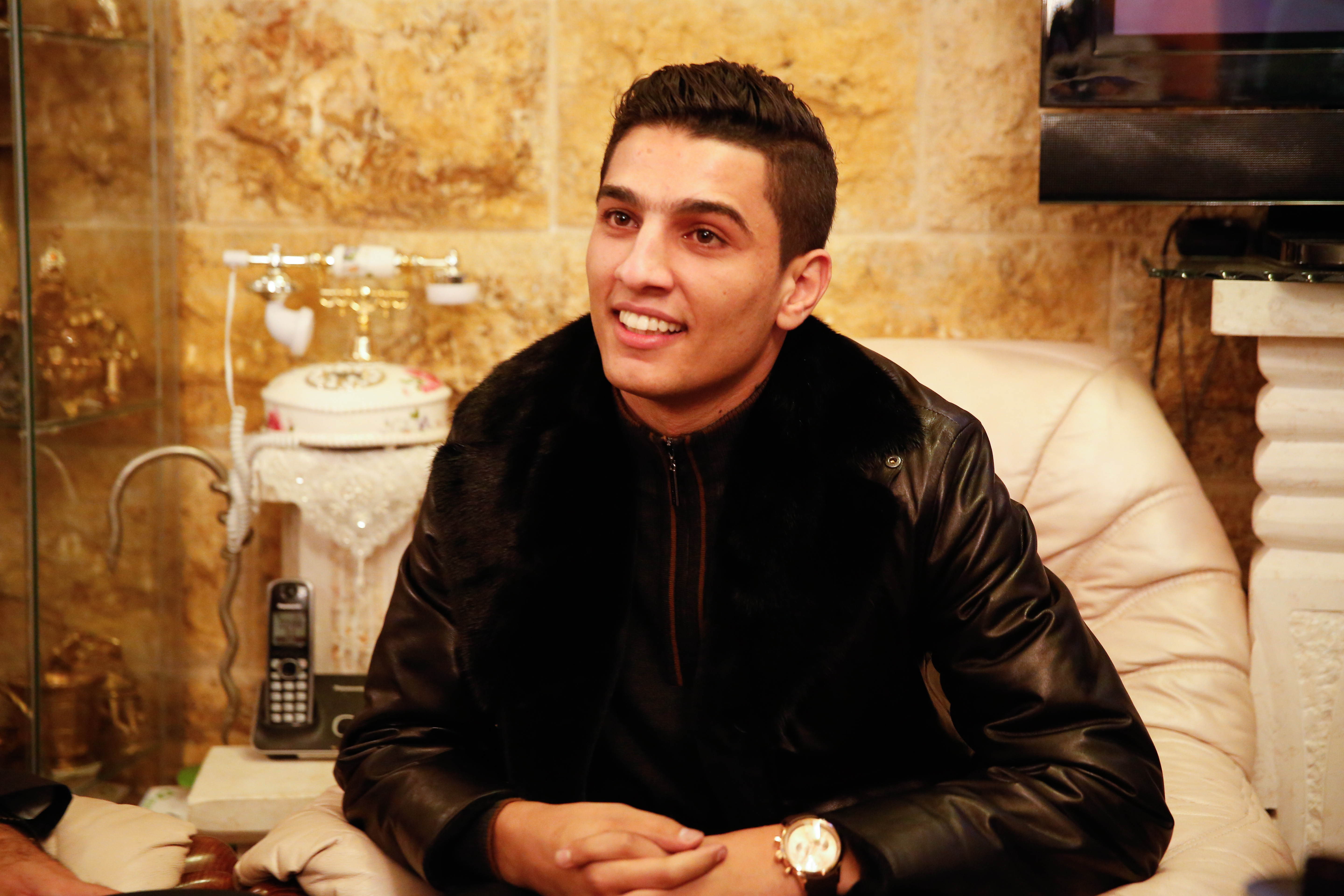 מוחמד עסאף